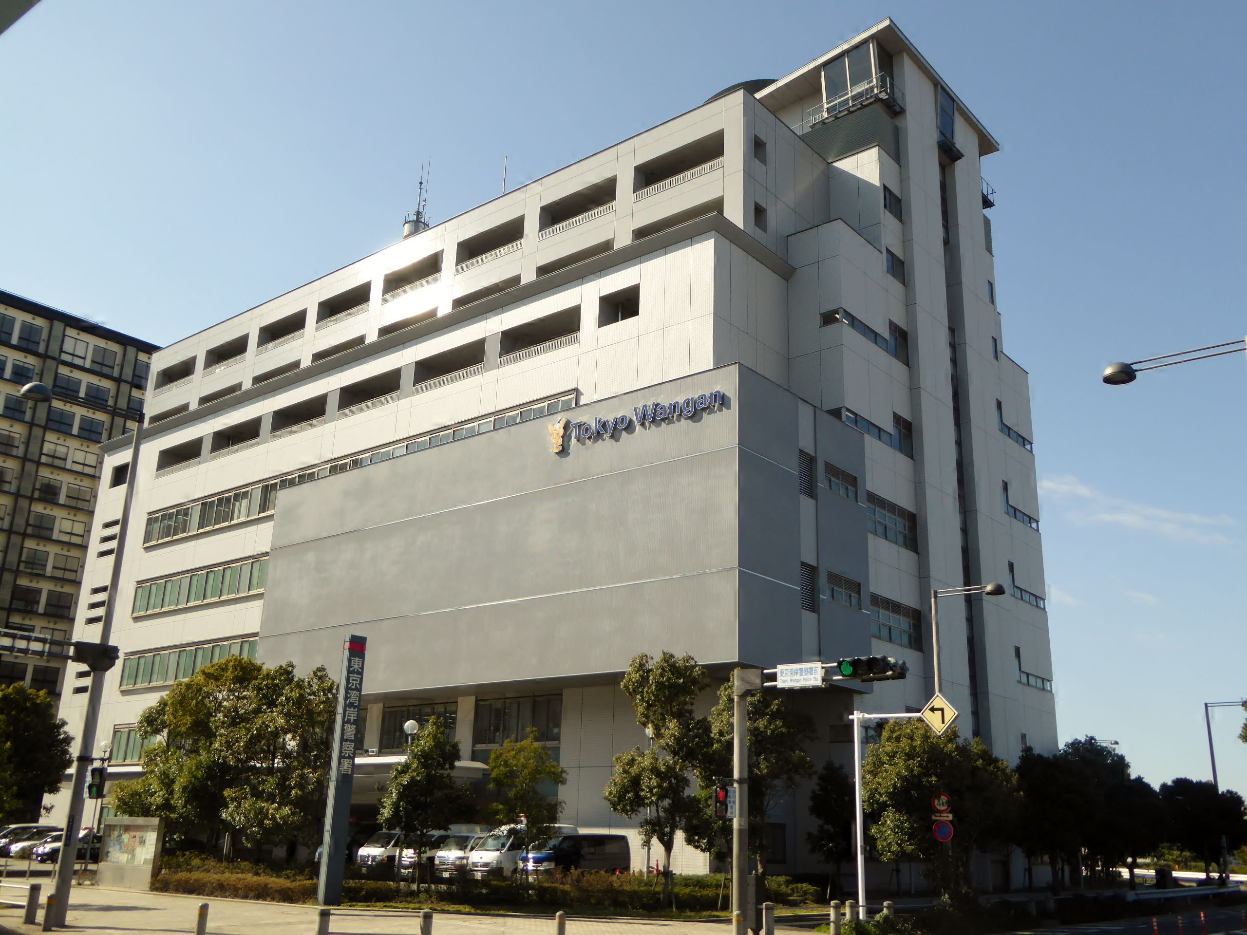 東京湾岸警察署を撮影。